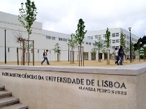 Vista do Departamento de Geologia da FCUL. Lisboa. Portugal.